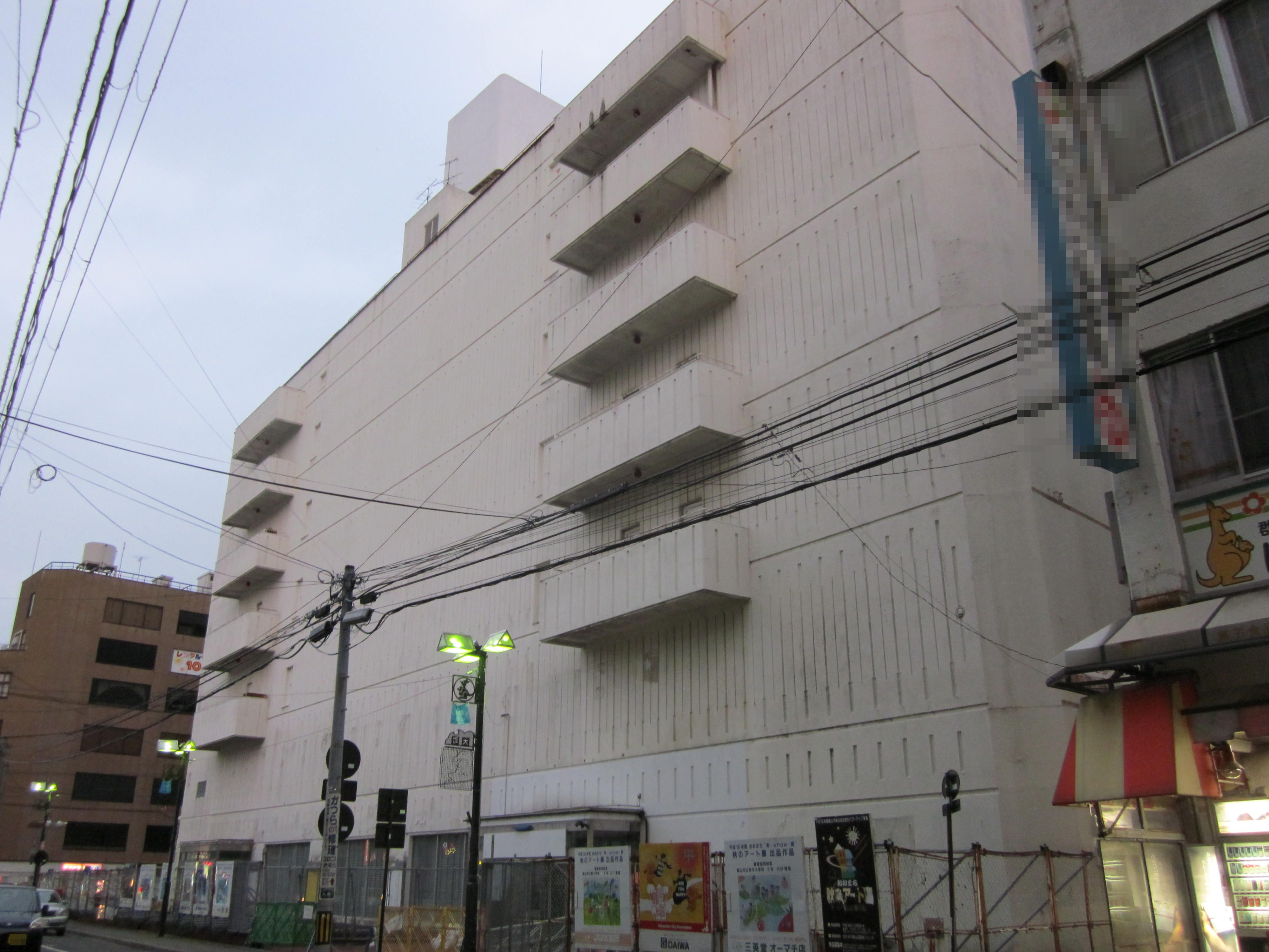 1994年12月以来空きビルとなっている。正面の建物は本館、裏手に別館がある。本館と別館の間には連絡通路が存在。